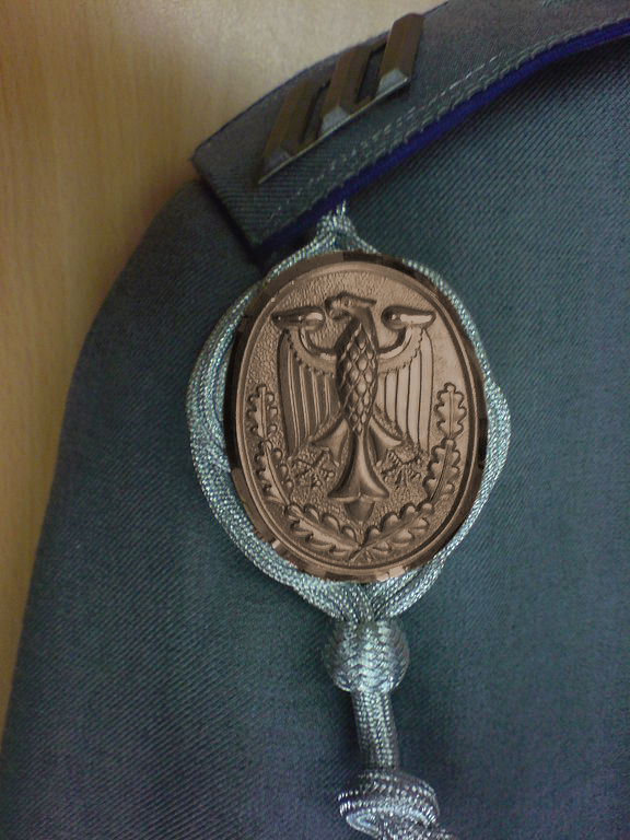 Bronzene Plakette der Schützenschnur